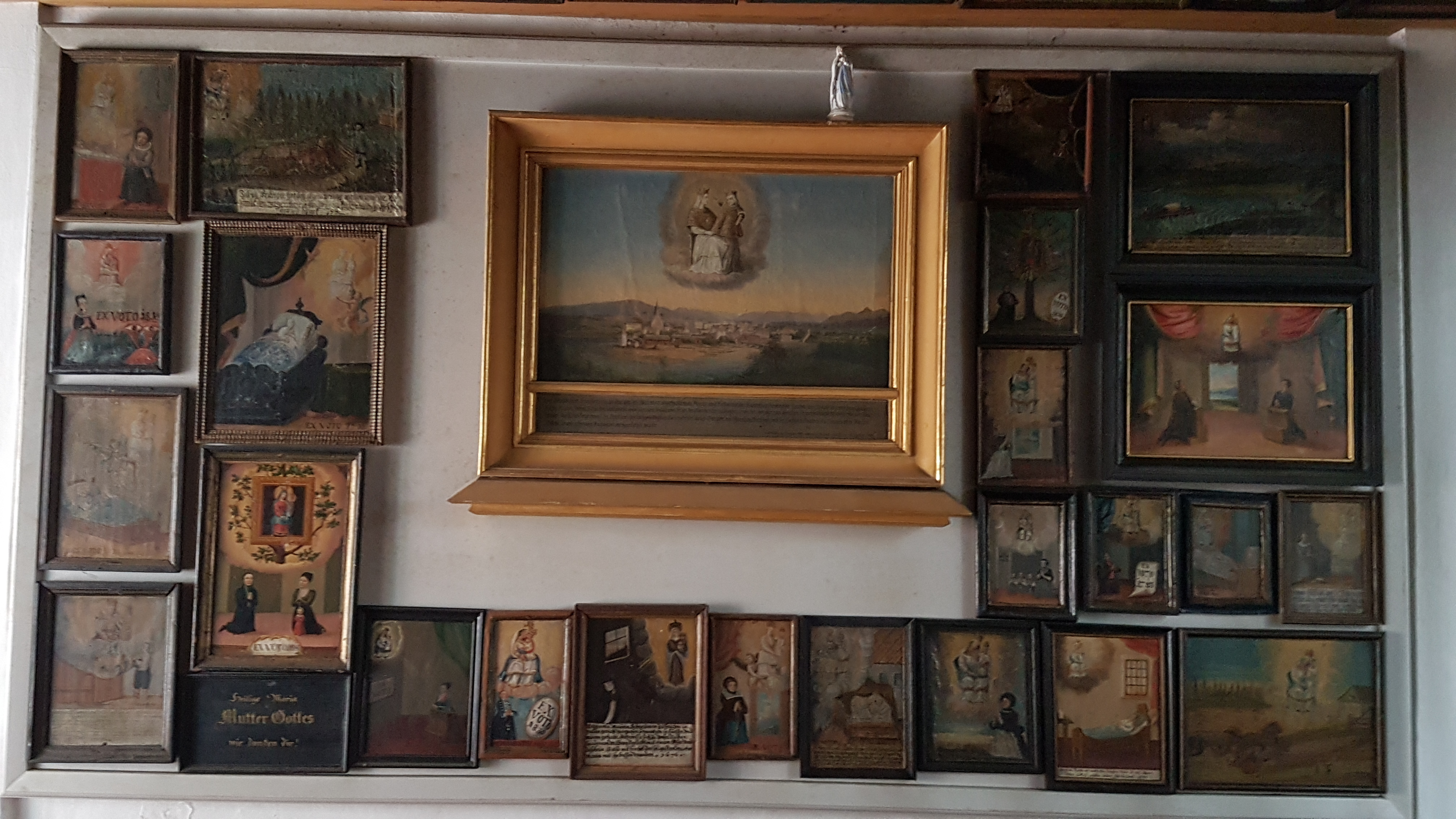 Mariä Heimsuchung (Mühlberg, Waging am See)